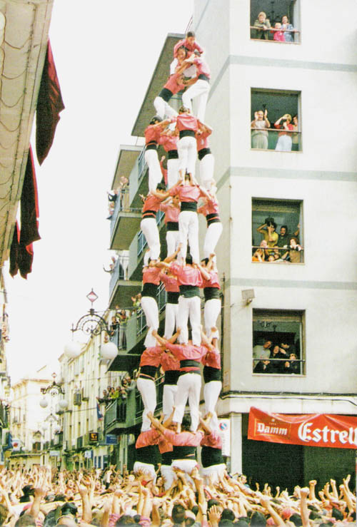 4 de 9 sense folre carregat el 21 d'octubre del 2001 per la Colla Vella dels Xiquets de Valls en la diada de Santa Úrsula. Es tracta del primer 4 de 9 sense folre carregat per aquesta colla en la segona època d'or, en la era moderna dels castells, i del segon assolit en la història de la colla (el primer fou el de les Festes de Santa Tecla del 1881).